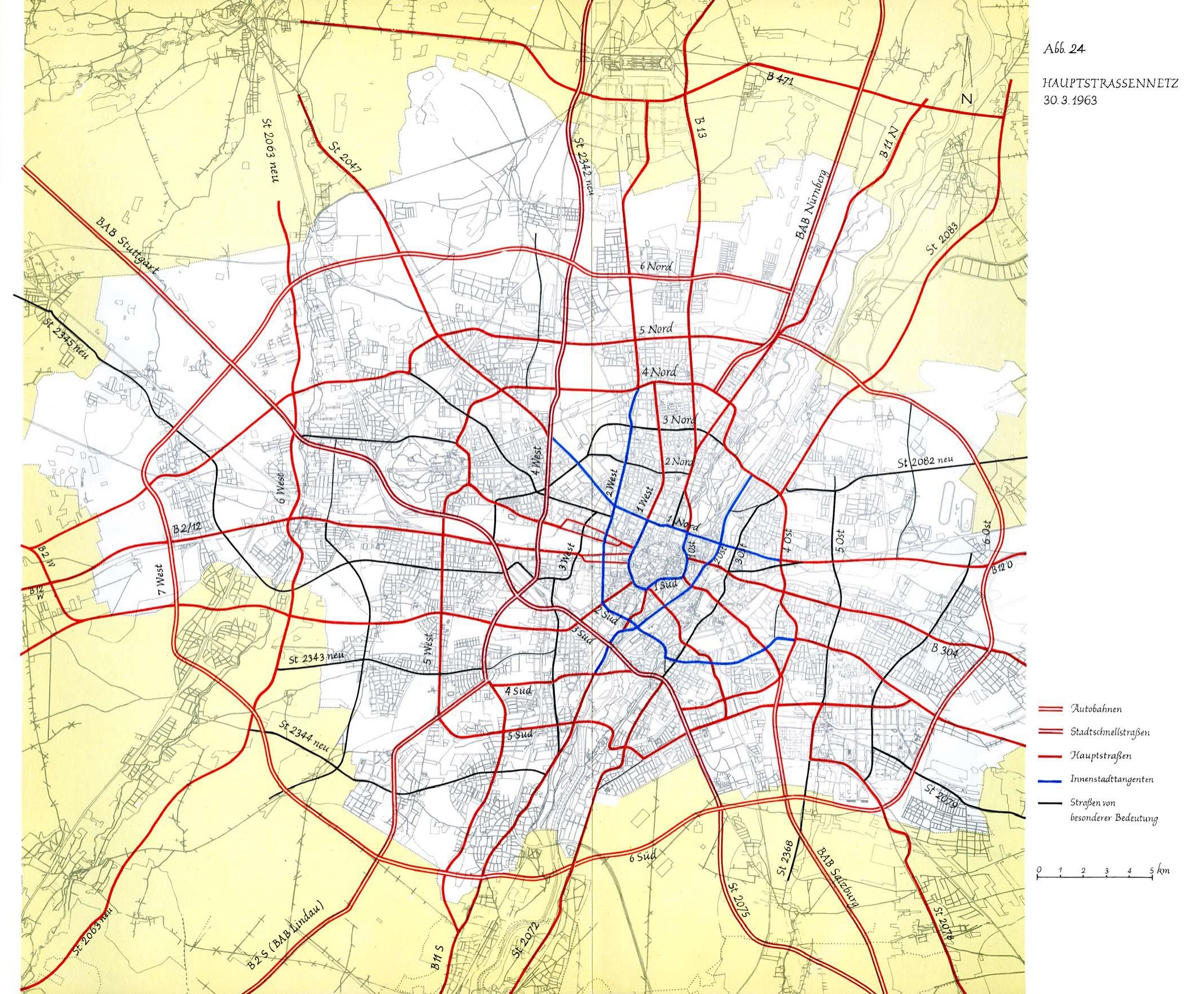 Abb. 24 des Stadtentwicklungsplans von 1963 mit dem geplanten Hauptstraßennetz für München